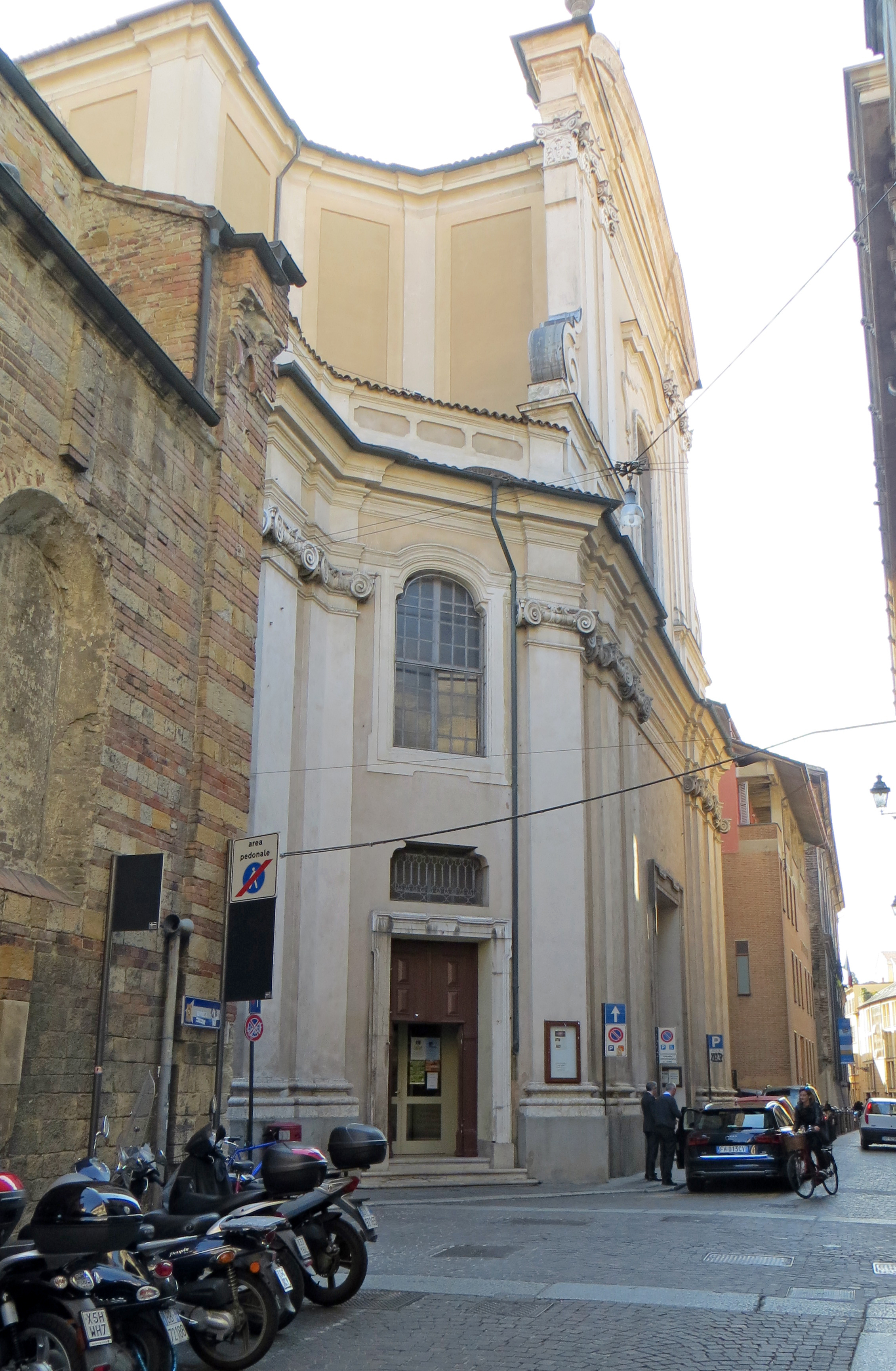 Chiesa di San Rocco - scorcio della facciata